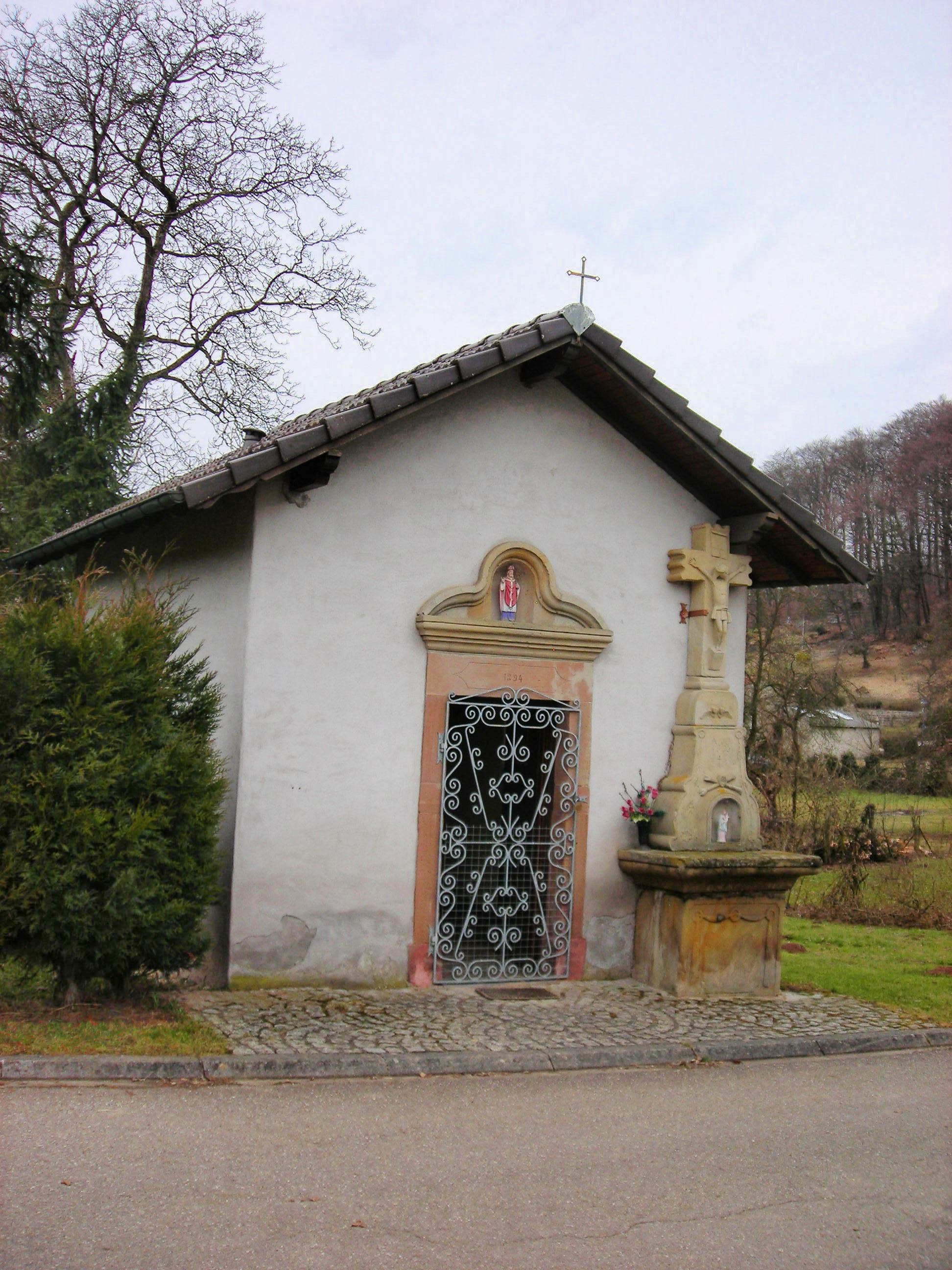 Chapelle St-Blaise à Berviller-en-Moselle (57 France)